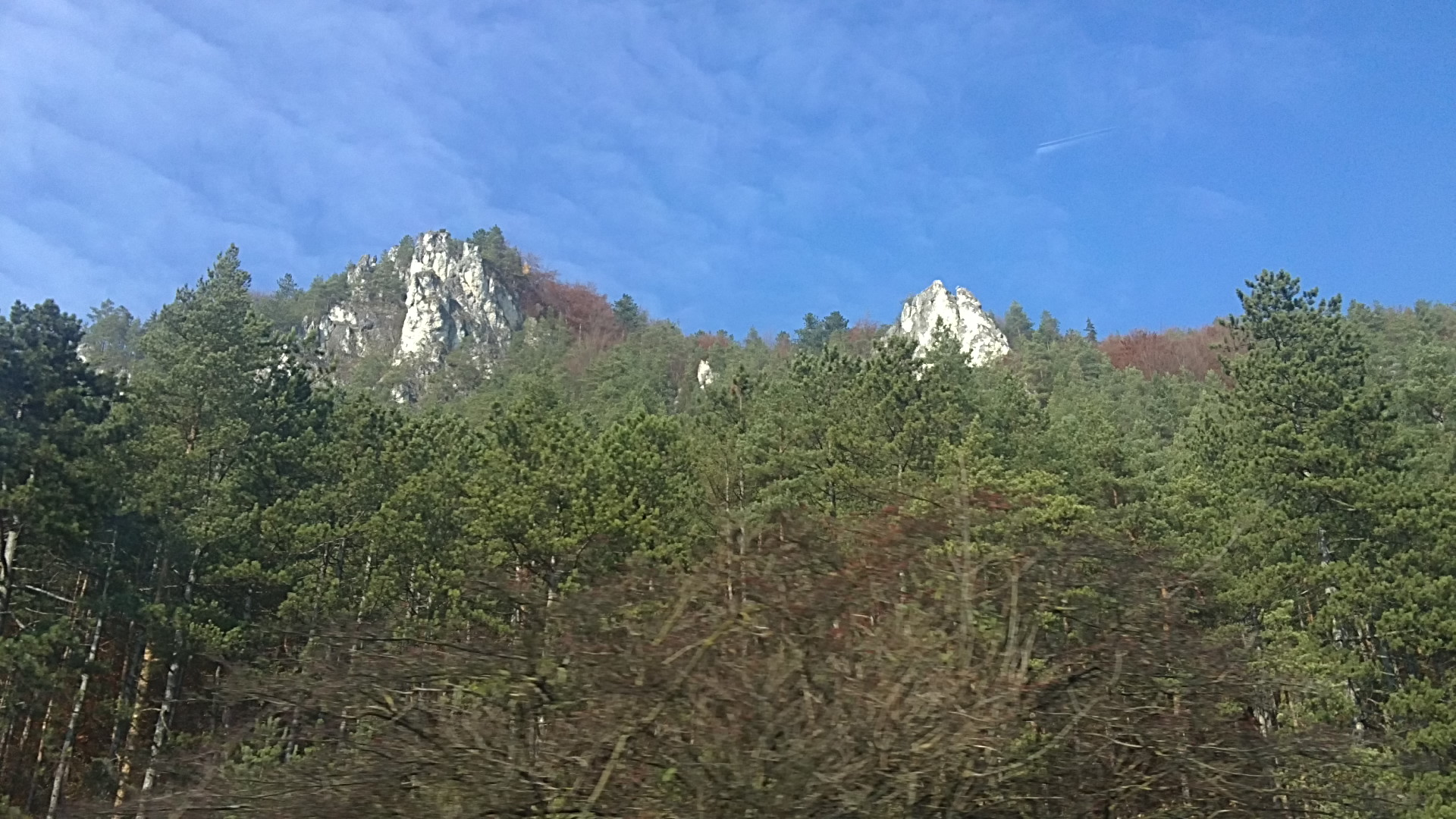 Slnečné skaly z Poluvsia